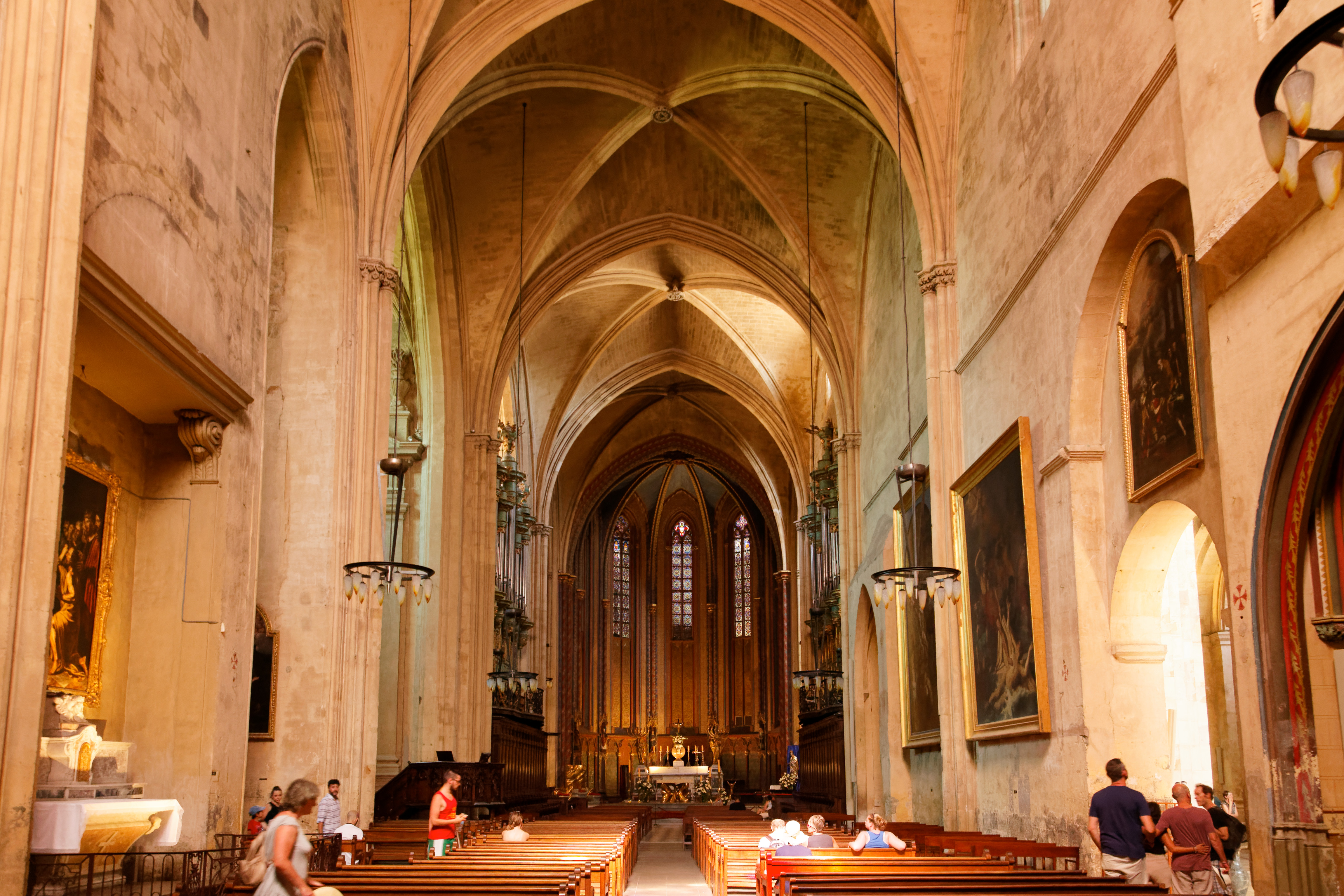 Kathedrale Saint-Sauveur in Aix-en-Provence